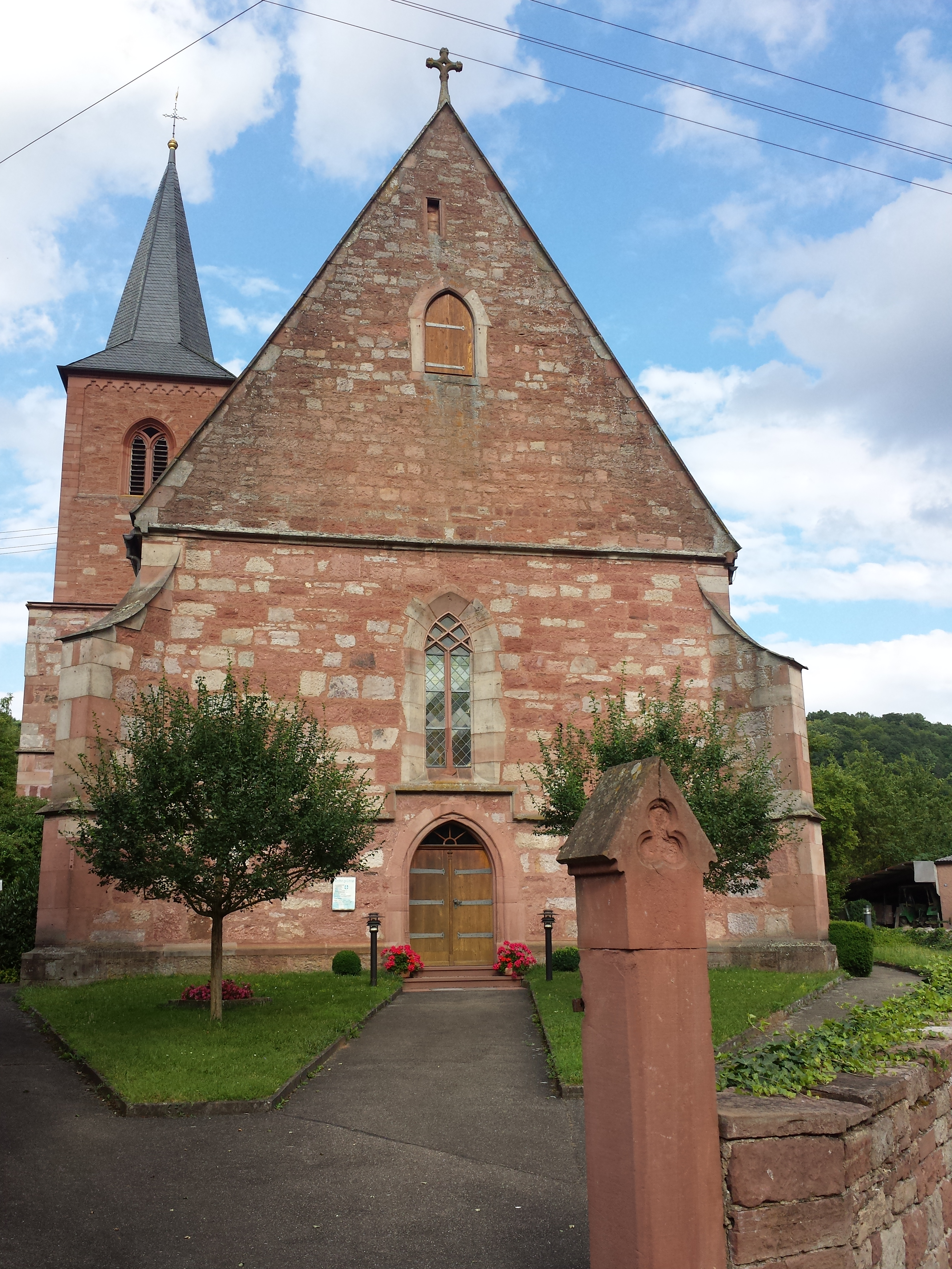 Niklashausen